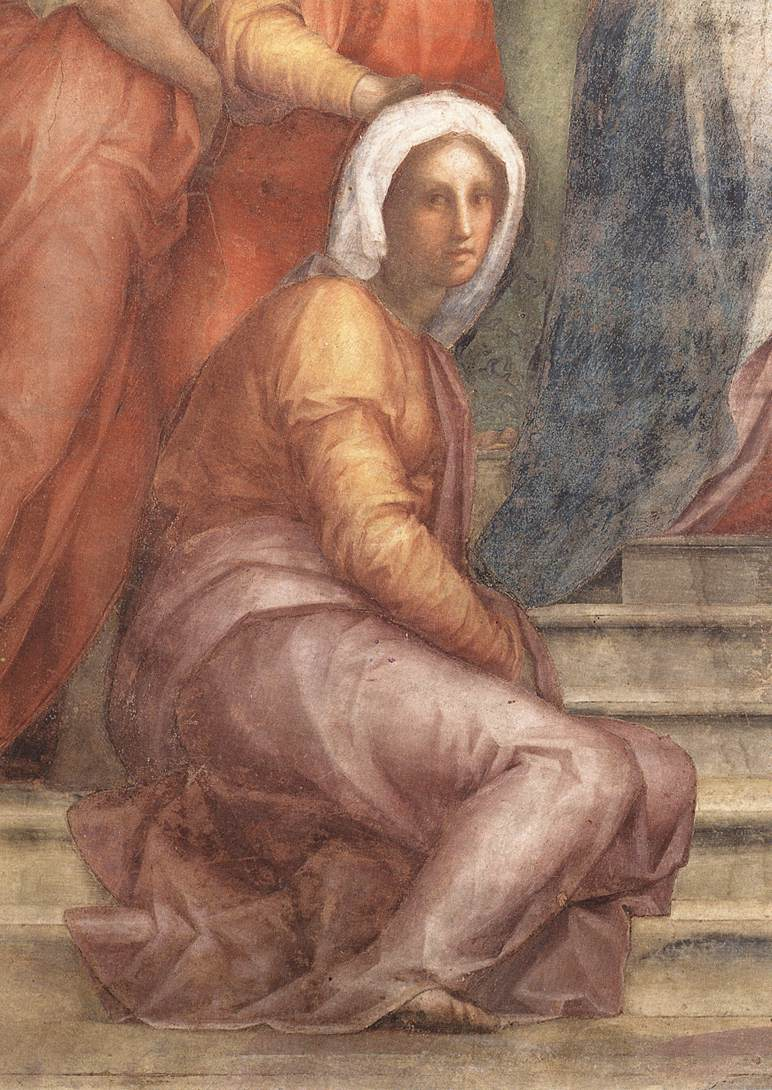 PONTORMO, Jacopo Visitation Fresco, 392 x 337 cm SS. Annunziata, Florence